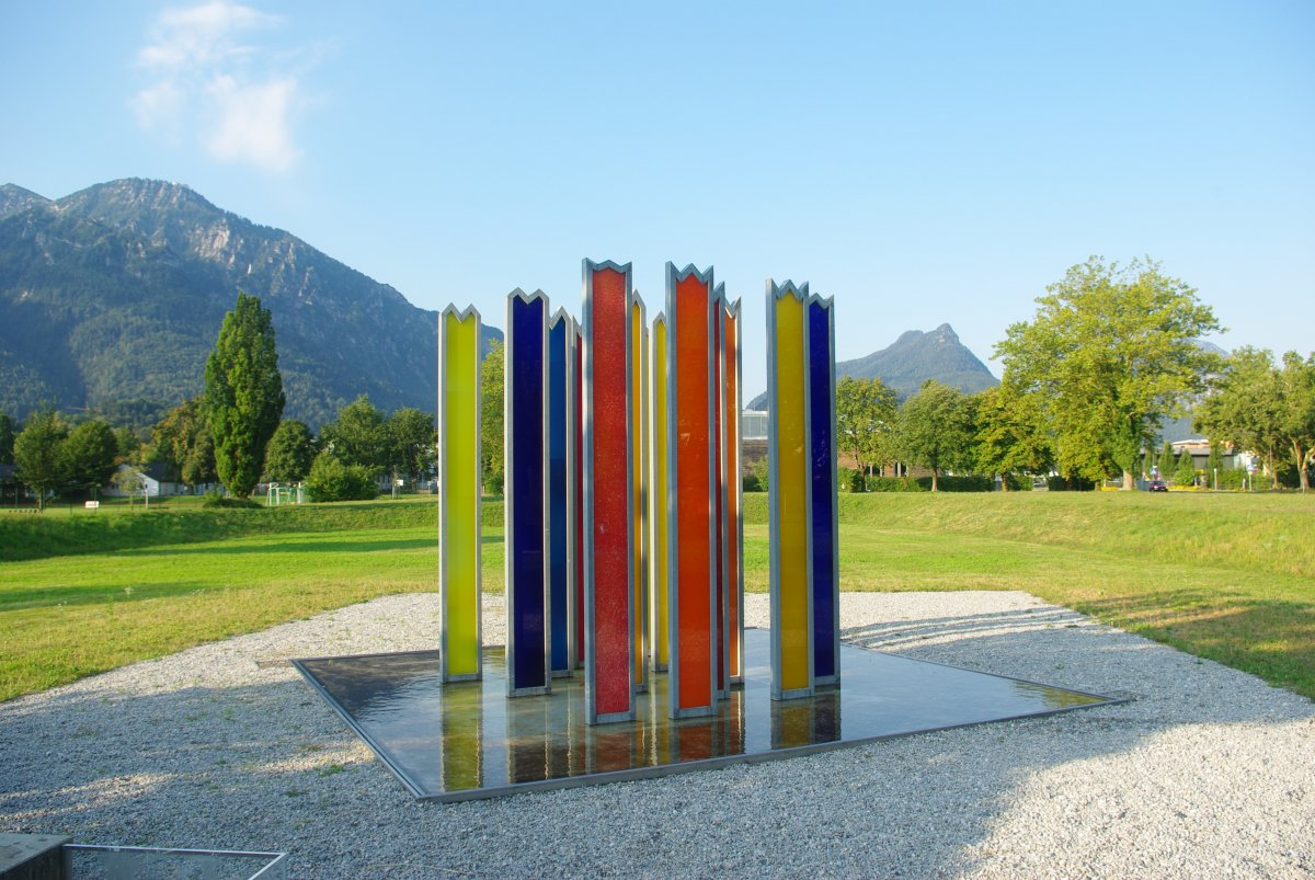 Gedenkstätte für die Opfer des Eishalleneinsturzes 2006 an der Münchner Allee in 83435 Bad Reichenhall